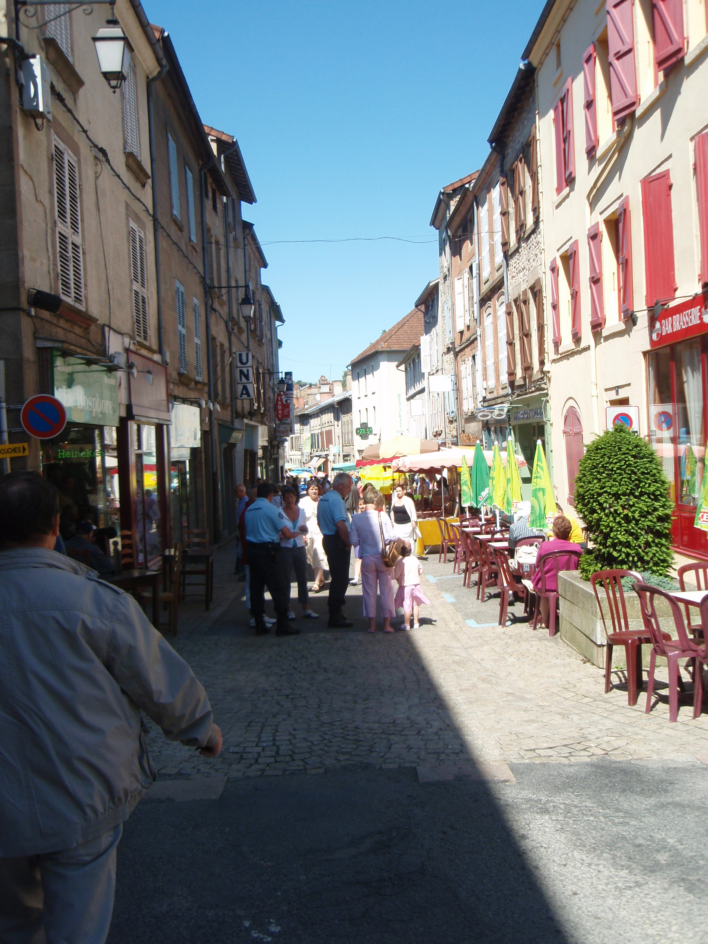 Bourganeuf rue principale